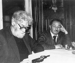 Escritor Francisco Coloane (izq.), Premio Nacional de Literatura, junto a Mario Uribe Velásquez (der.), autor de "Crónicas de Chiloé".